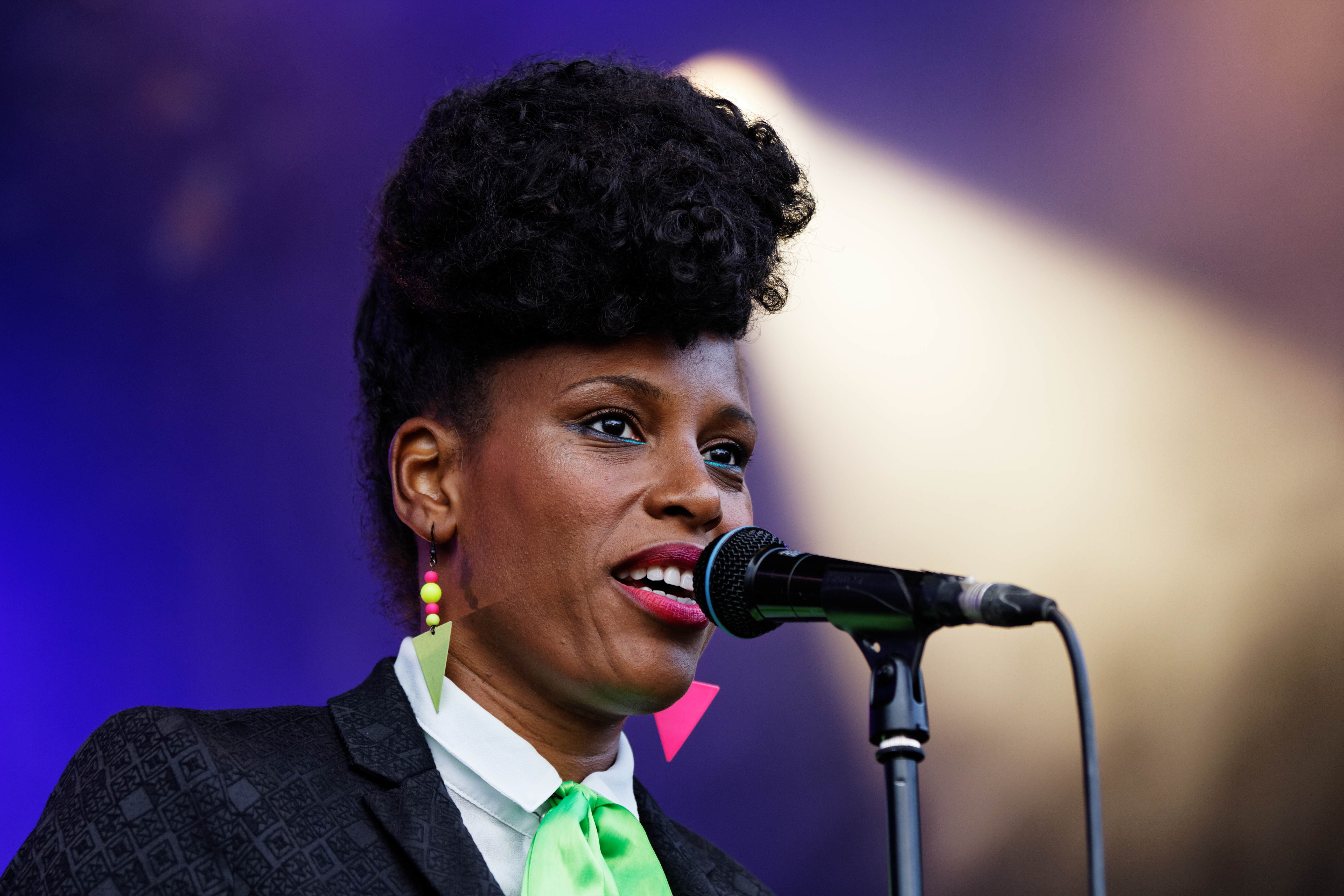 Sandra Nkaké en concert sur la scène Cabaret lors du festival du bout du Monde à Crozon dans le Finistère (France).